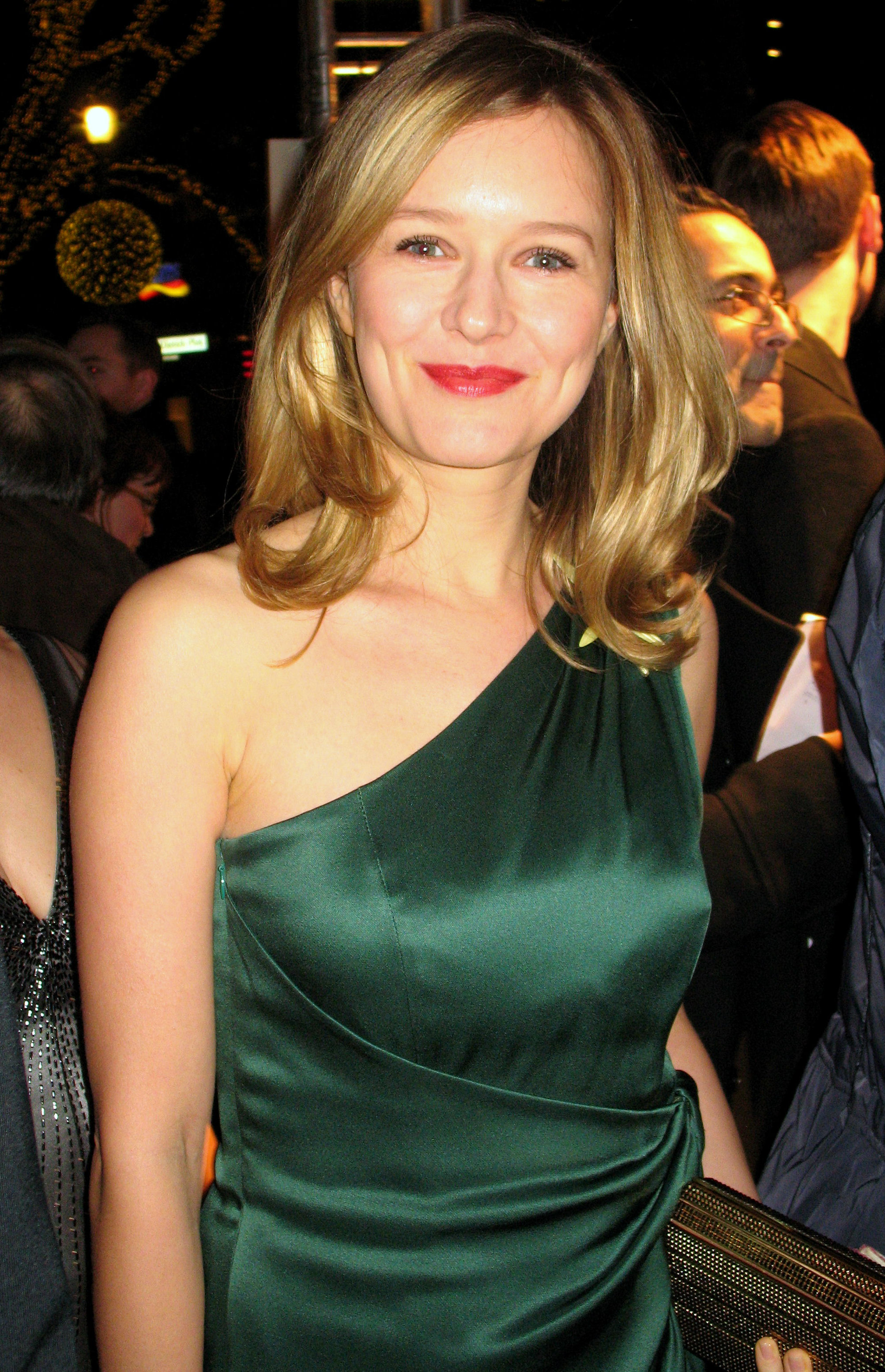 Stefanie Stappenbeck bei der Eröffnung der Berlinale 2009